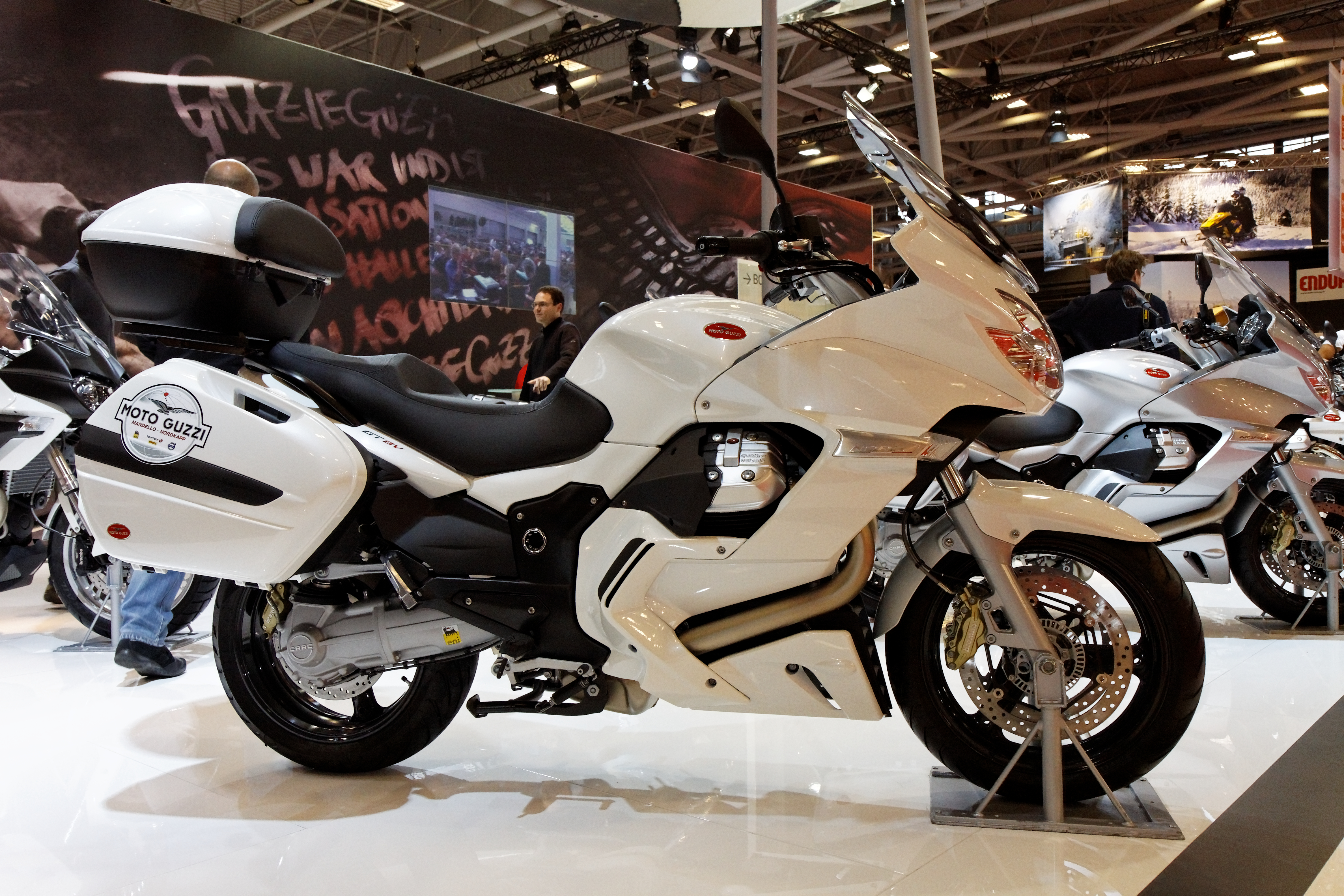 Moto Guzzi - Norge GT 8V ABS Raid Capo Nord